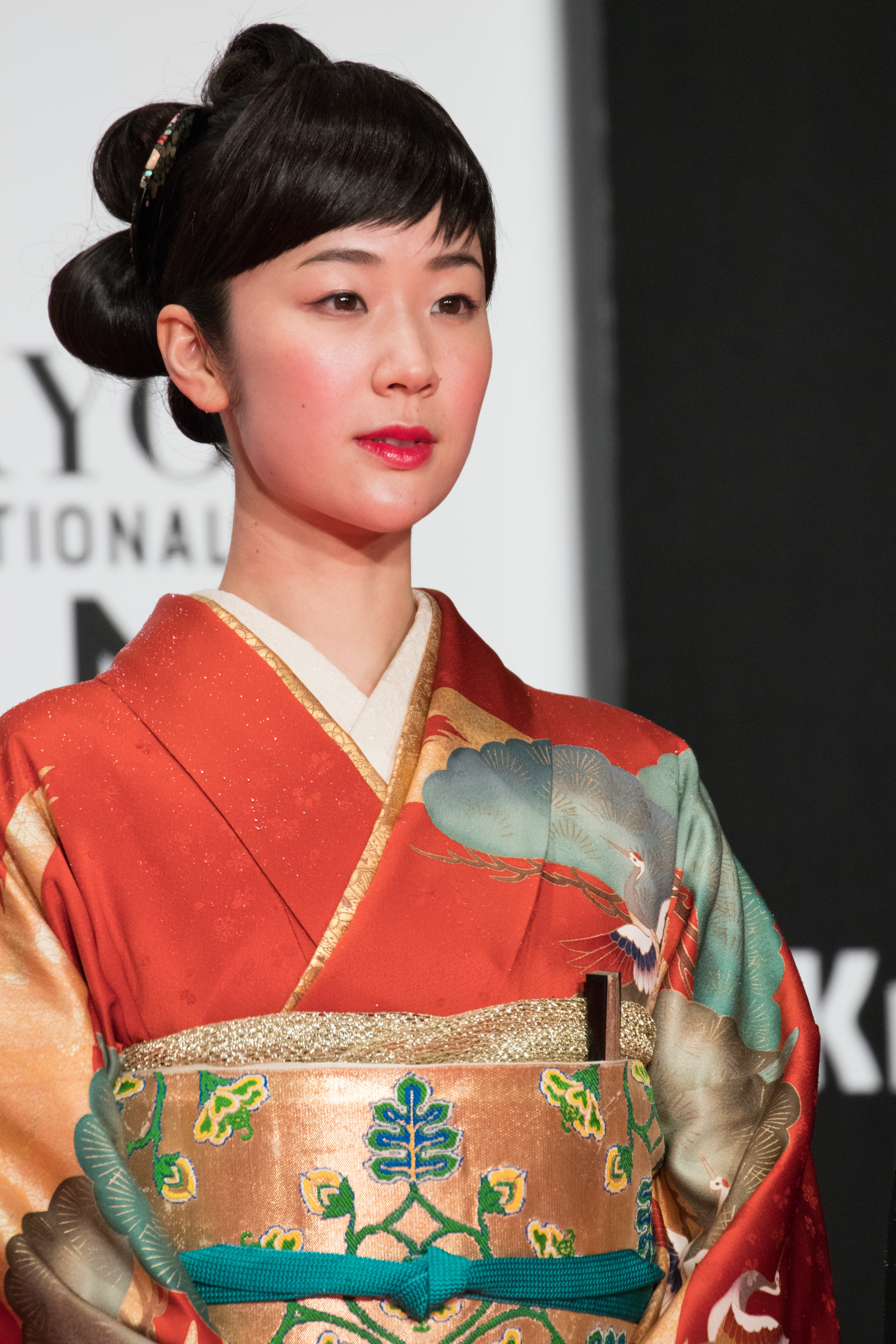 第29回 東京国際映画祭 オープニングセレモニー 黒木華